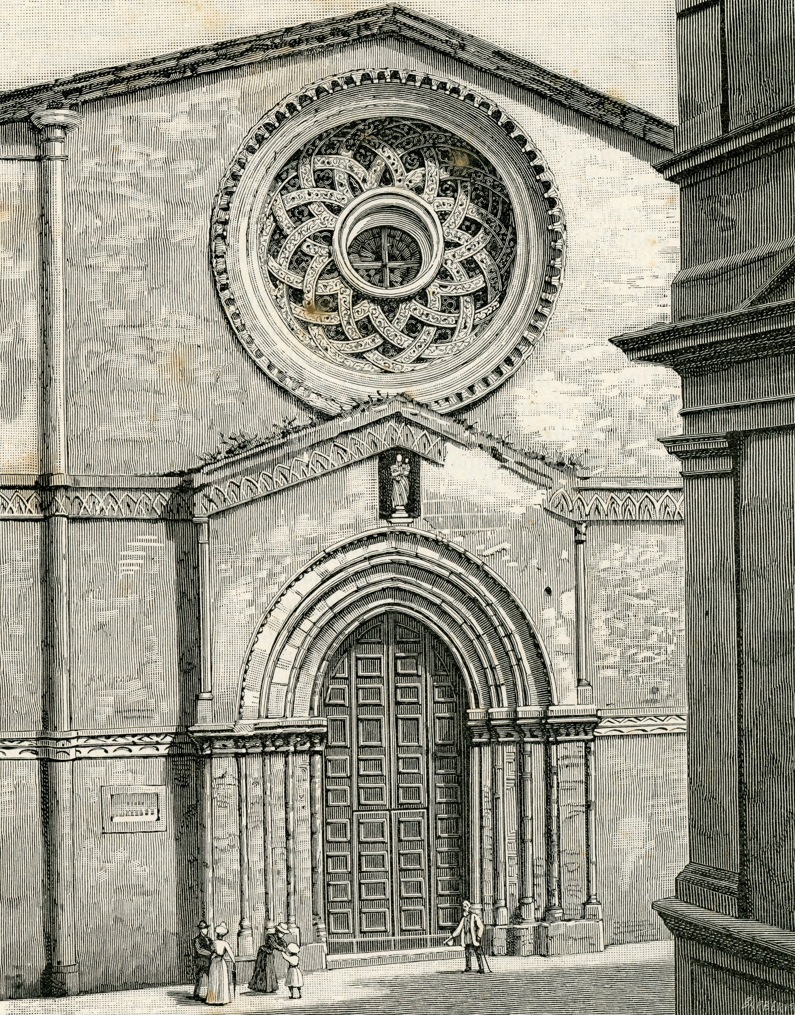 Trapani: Prospetto della chiesa di Sant’Agostino (xilografia di Barberis 1892).